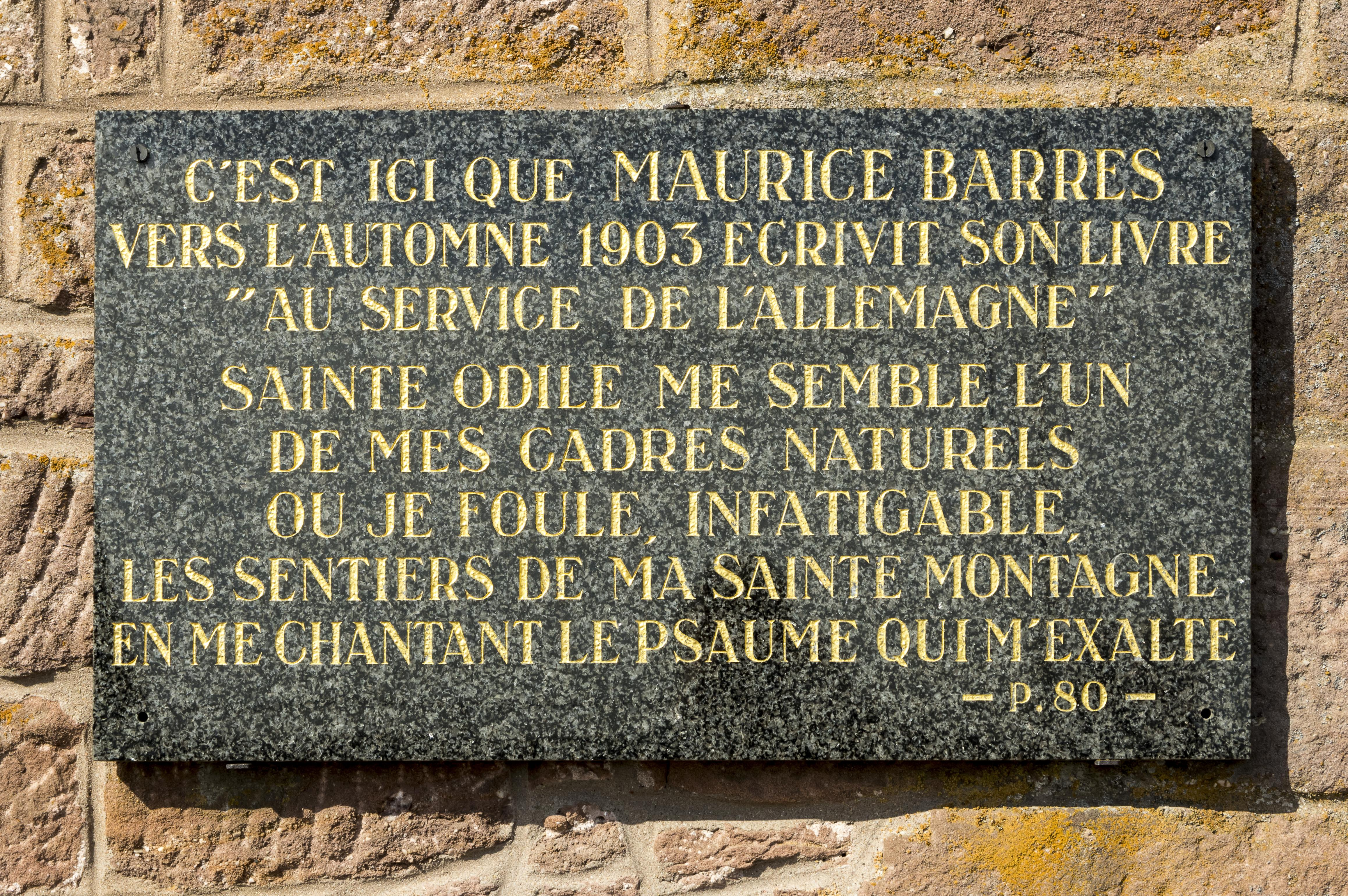 Bilder vom Le Mont ste. Odile (Odilienberg im Elsaß) Tafel mit Widmumg